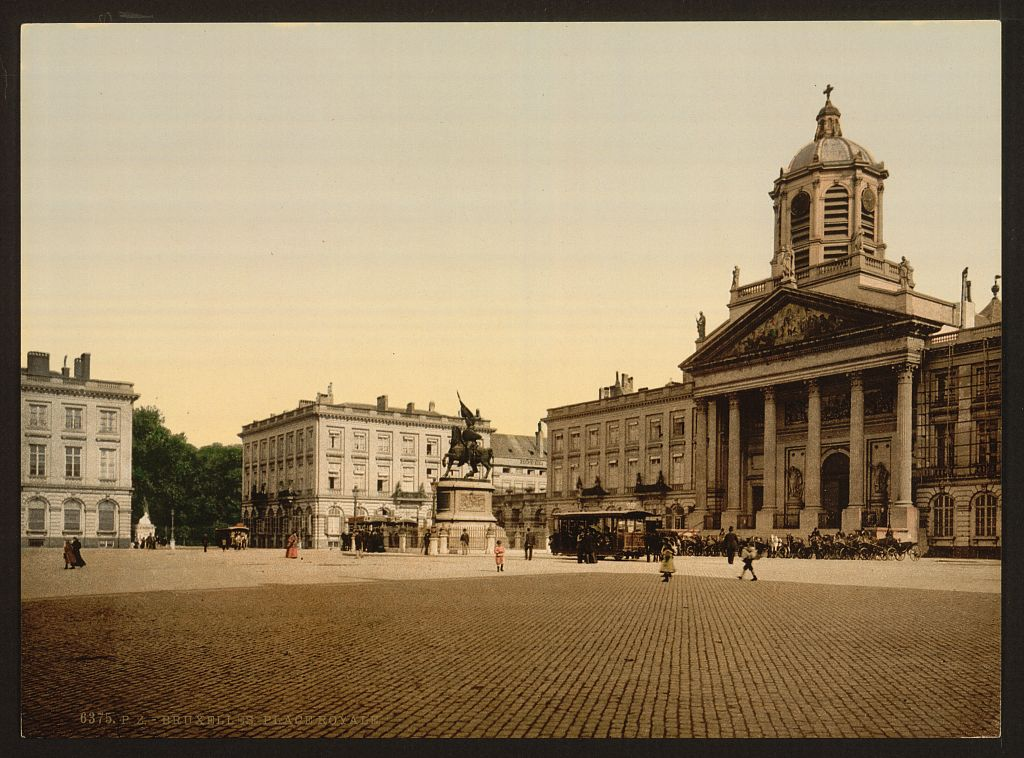 Het Koningsplein in Brussel, België (ca. 1890-1900)